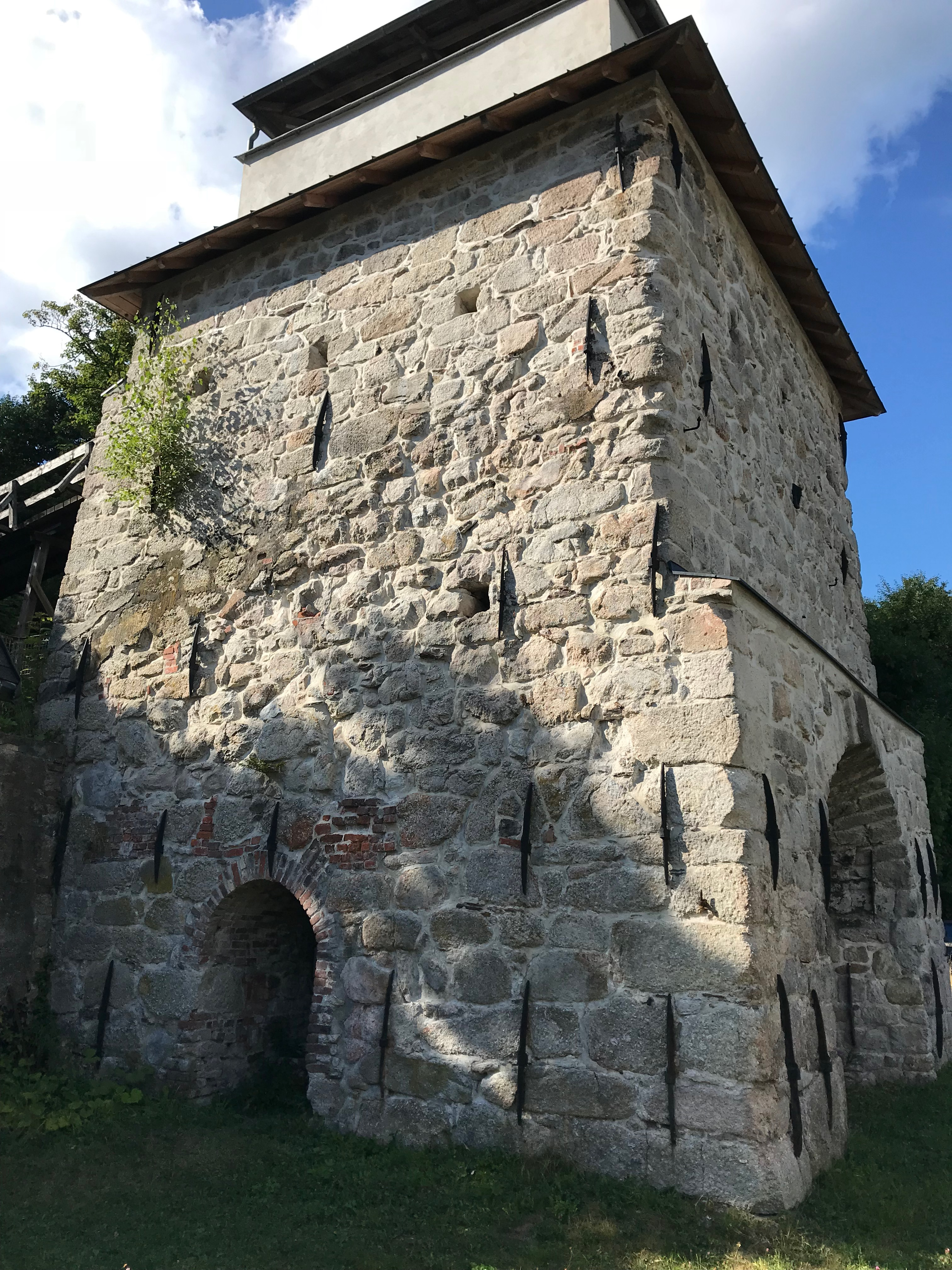 Hochofen